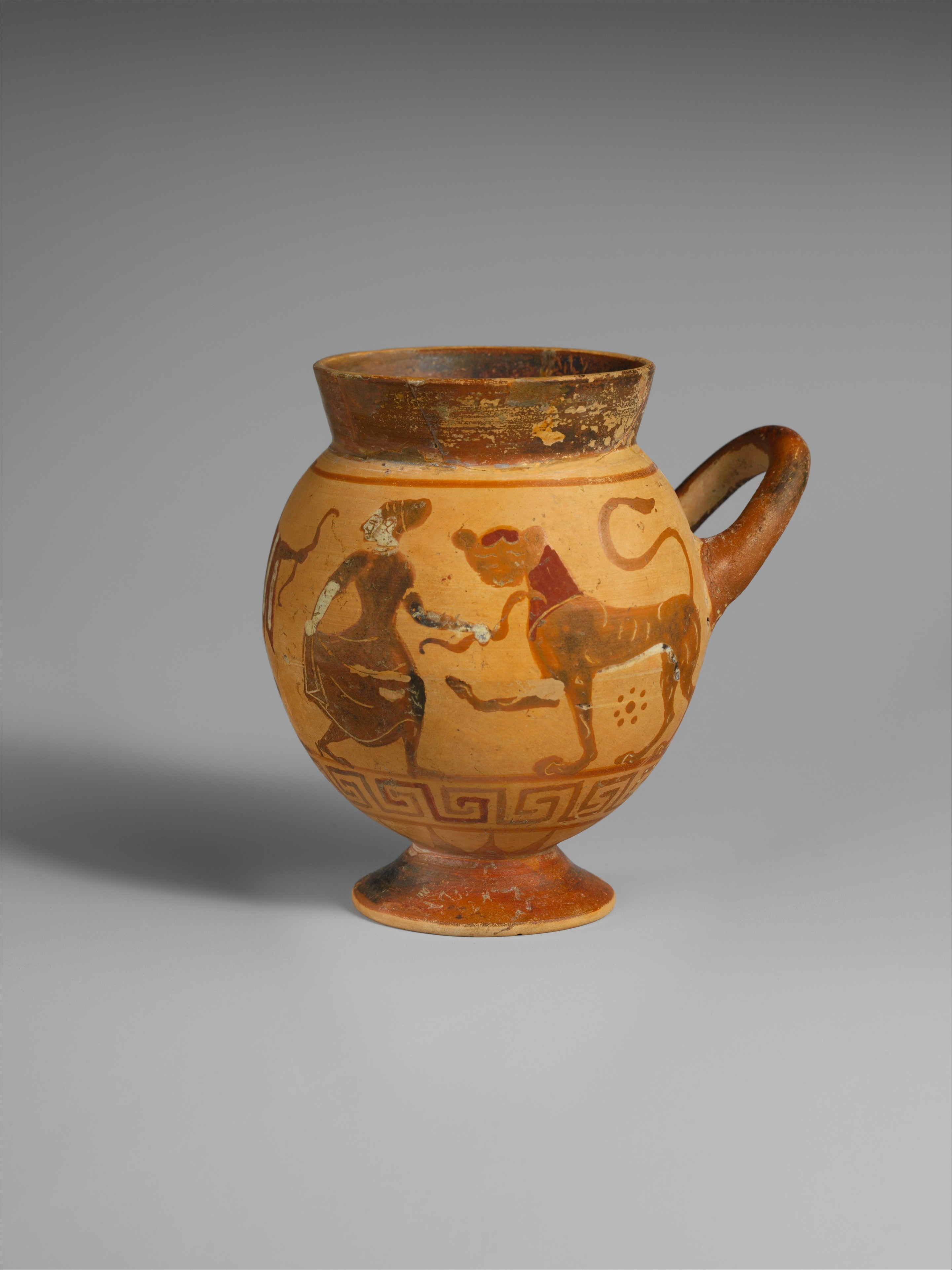 Etruscan; Cup; Vases